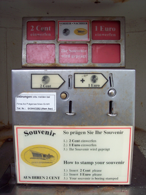 Elektrische Souvenir Prägemaschiene